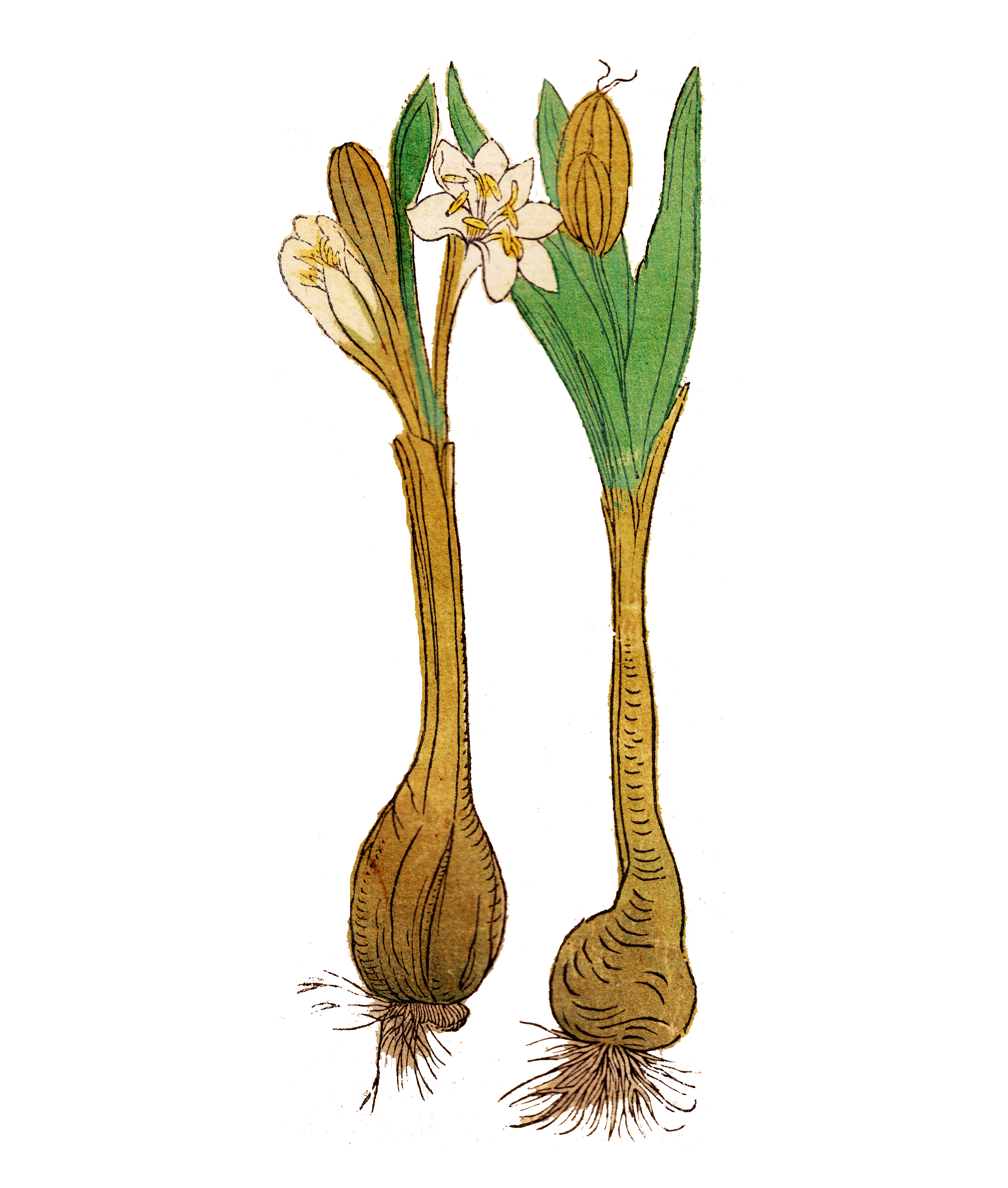 Abbildung der Herbstzeitlose (Colchicum autumnale)